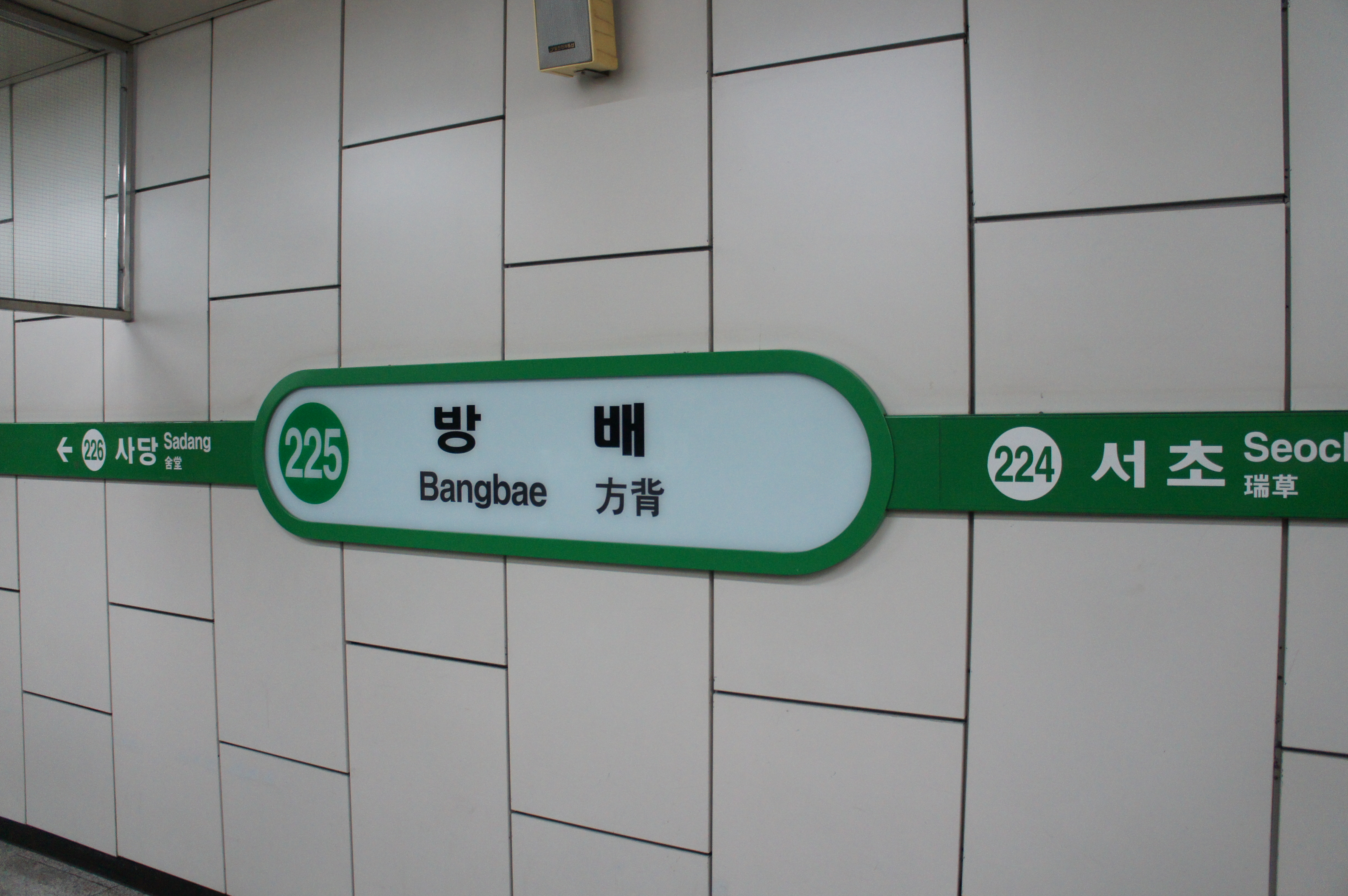 방배역 역명판